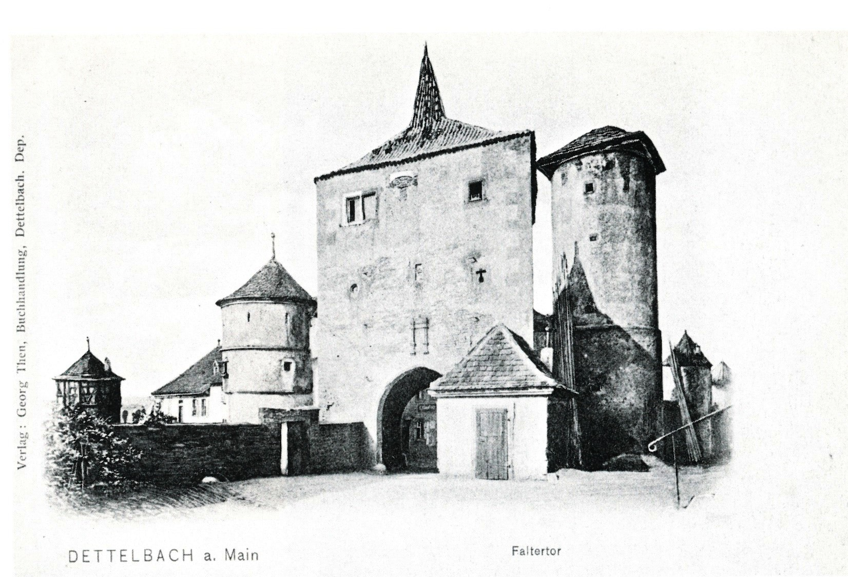 Fotografie Faltertor, Männerturm, Zollhäuschen, Dettelbach um 1900